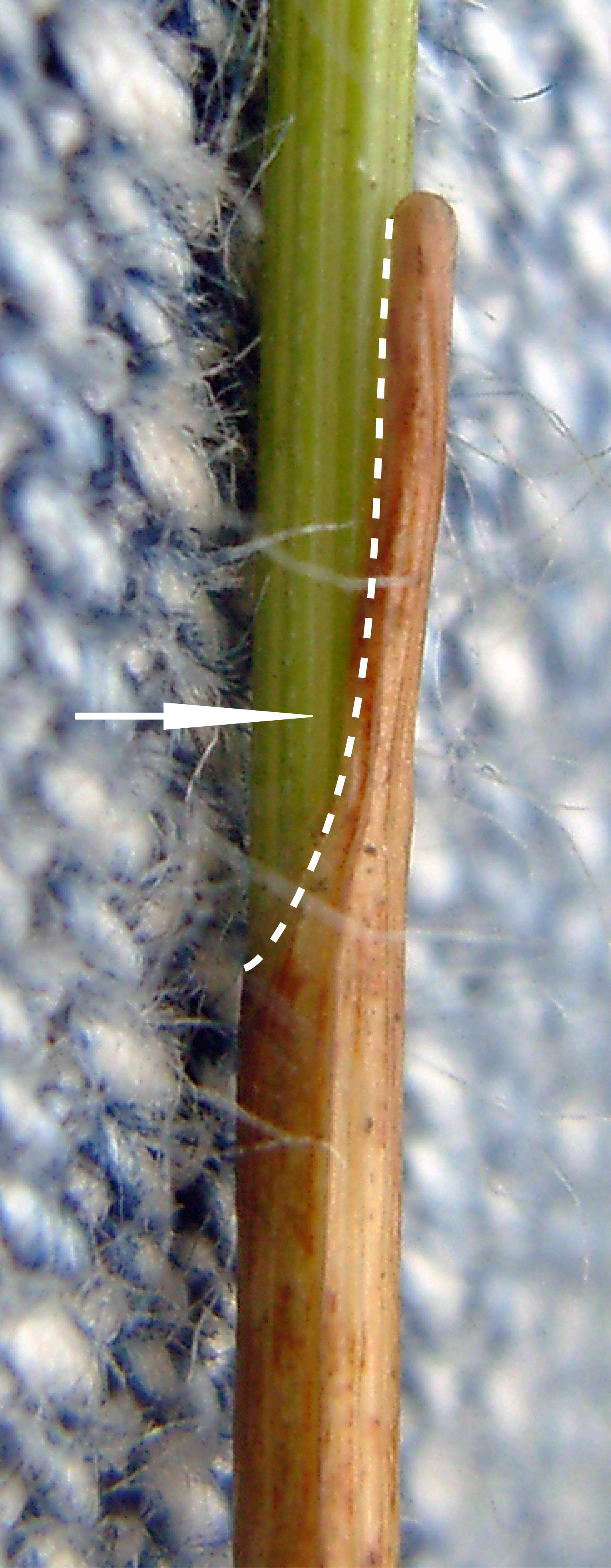 Blattspreite der Deutschen Rasenbinse (Trichophorum cespitosum subsp. germanicum), Nordwestdeutschland